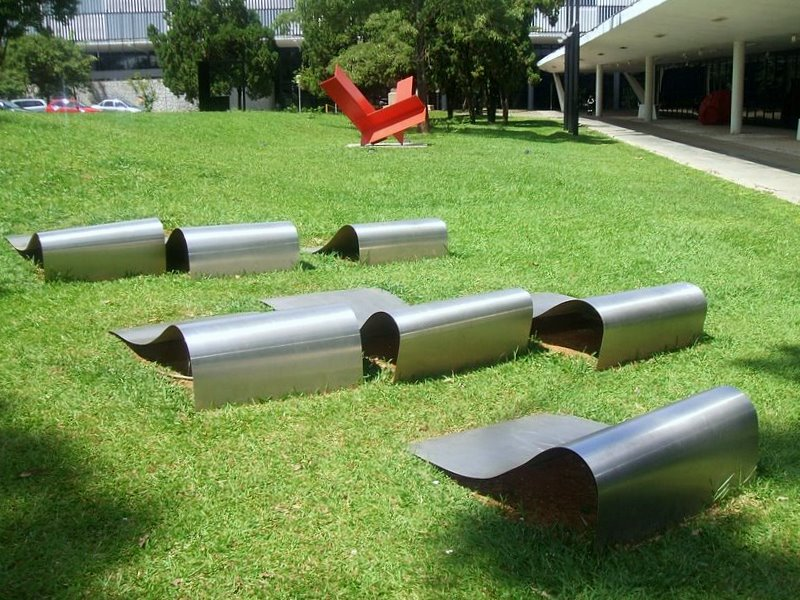 Amélia Toledo - Sete Ondas, 1995. Acervo do Museu de Arte Moderna de São Paulo, no Parque do Ibirapuera.